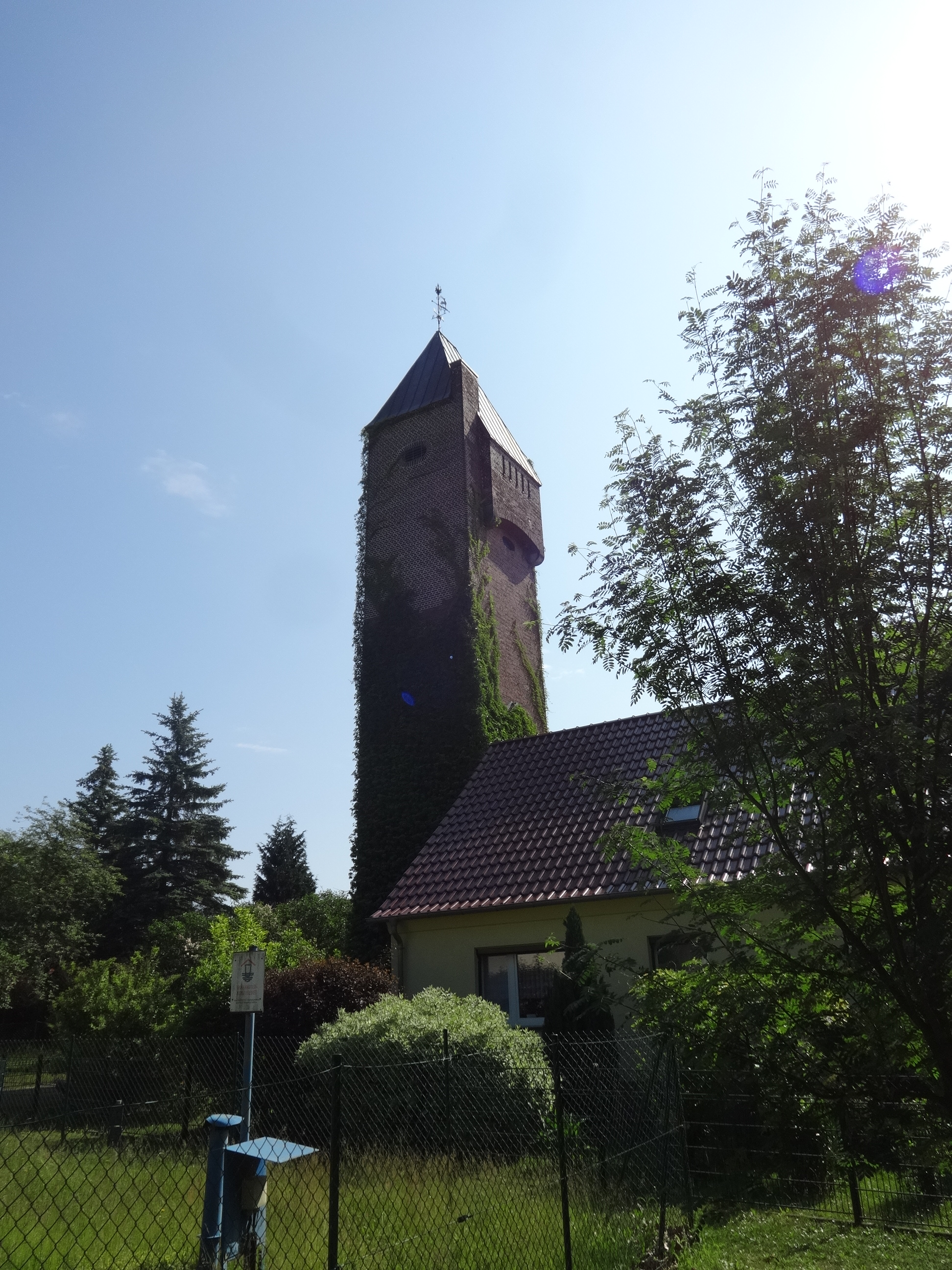 Aussichtsturm im ehemaligen Wasserturm in Kehrigk, Storkow (Mark), Brandenburg